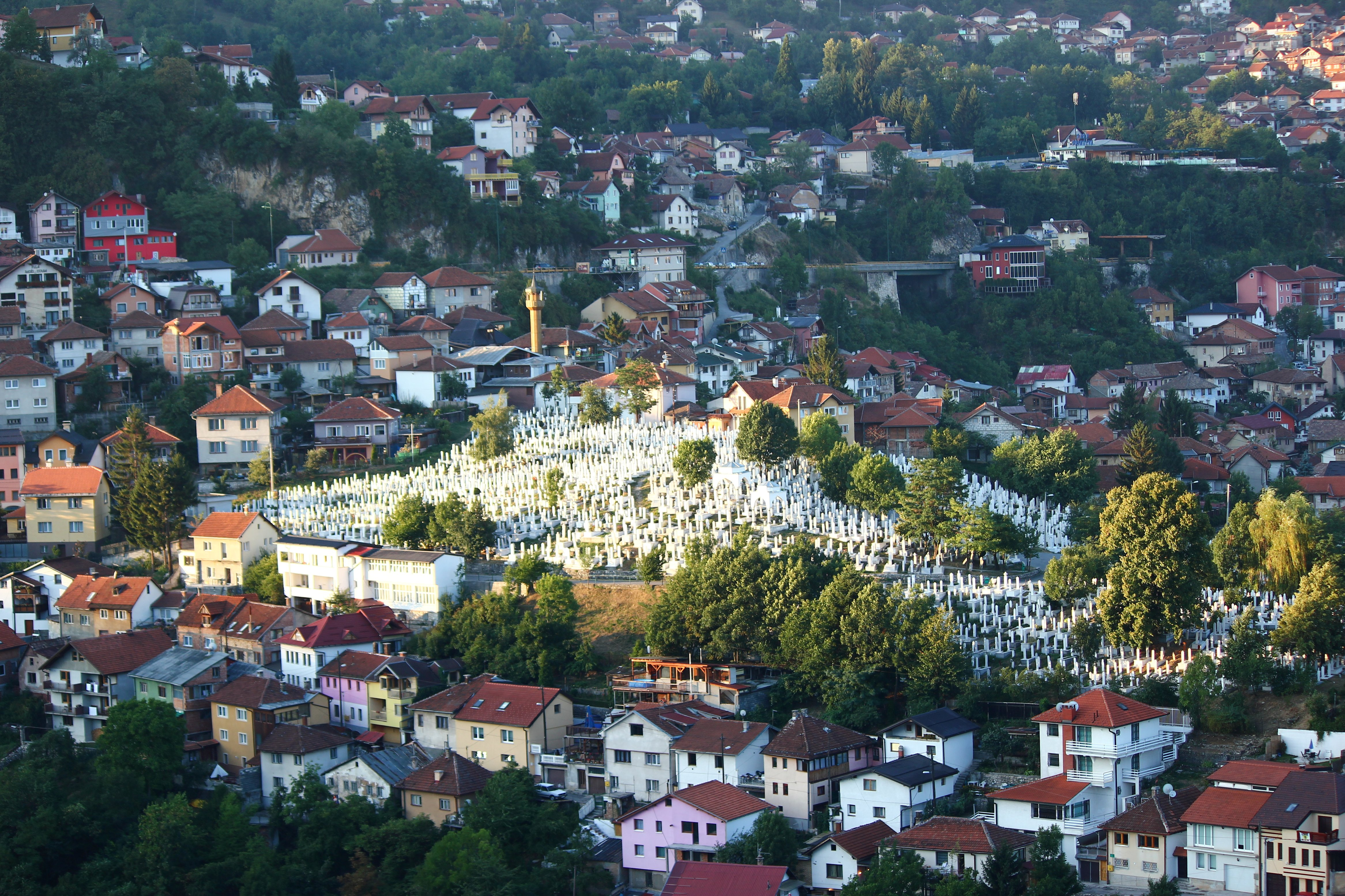 Blick auf den Friedhof Alifakovac in Sarajevo, 2012.